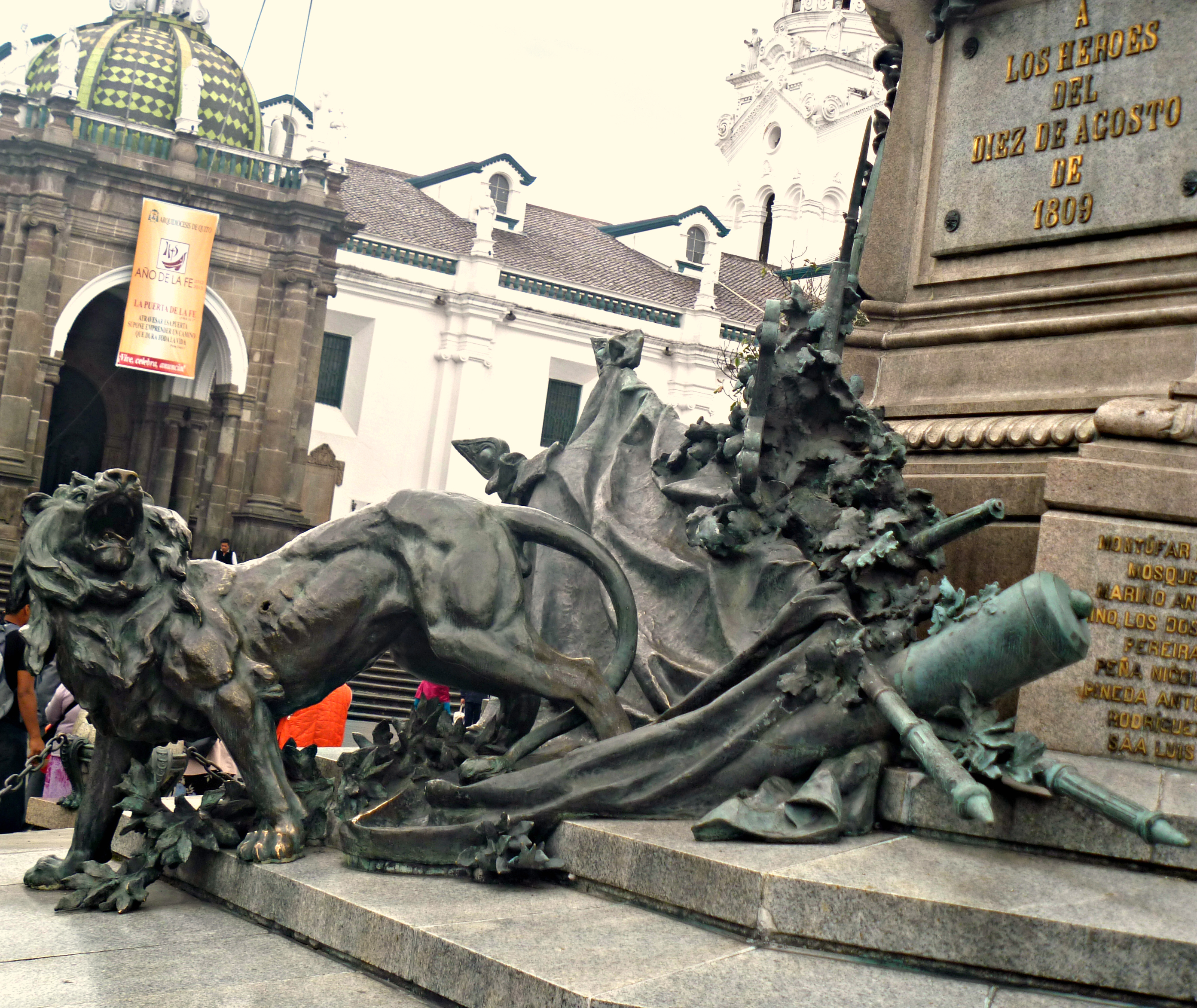 Detalle del Monumento a la Independencia, levantado en la Plaza Grande de Quito DM (Ecuador). El león, animal heráldico símbolo del imperio español, es una alegoría de la independencia, pues se retira herido aunque aún desafiante, mirando a la efigie de la libertad que se encuentra en la cima de la columnata.